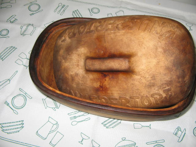 Roemischer Topf Quelle: eigene Aufnahme 22 January 2005. Fotograf: Janez Novak, Ljubljana, Slovenija